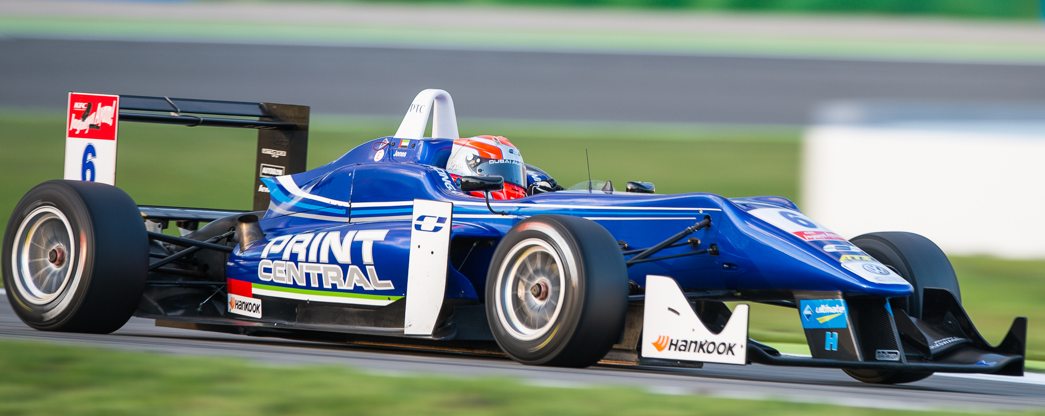 Carlin,DTM,Dallara F312,Deutsche Tourenwagen Masters,Edward Jones,F3 FIA European Championship,FIA Formel 3 Europameisterschaft,Hockenheimring,Motorsport,Volkswagen